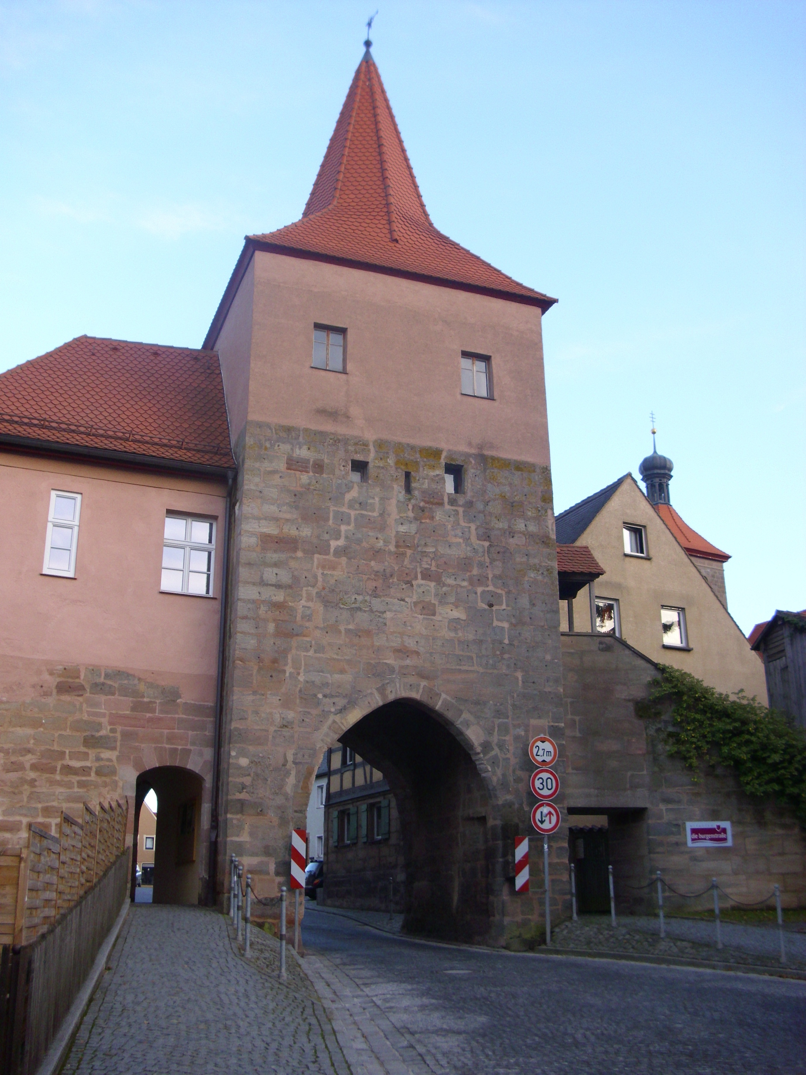 Oberes Tor am Stillaplatz 2 von der westlich gelegenen Windsbacher Straße her fotografiert